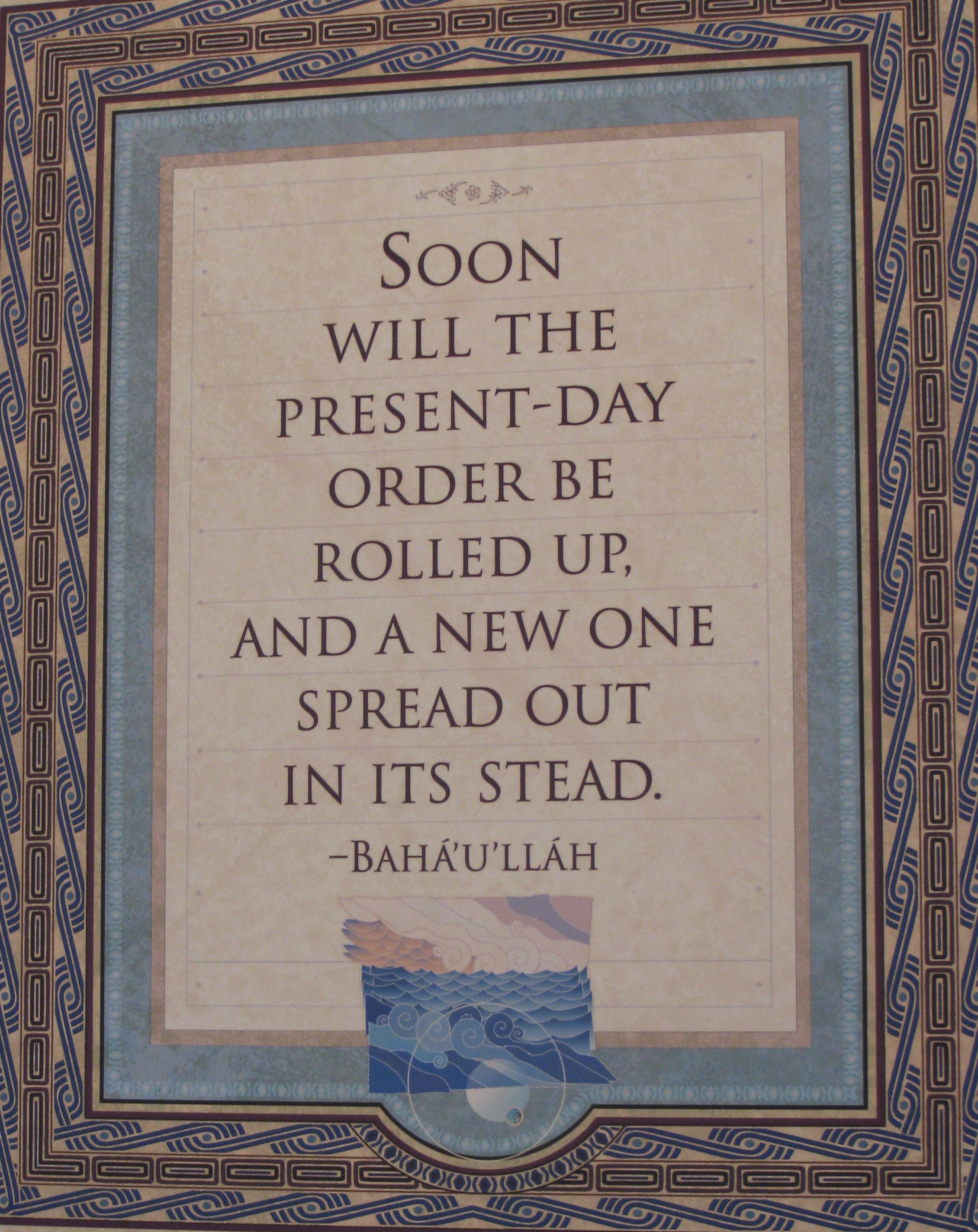 Bahai Texts טקסטים בהאיים במרכז המבקרים שבגנים הבהאיים בחיפה